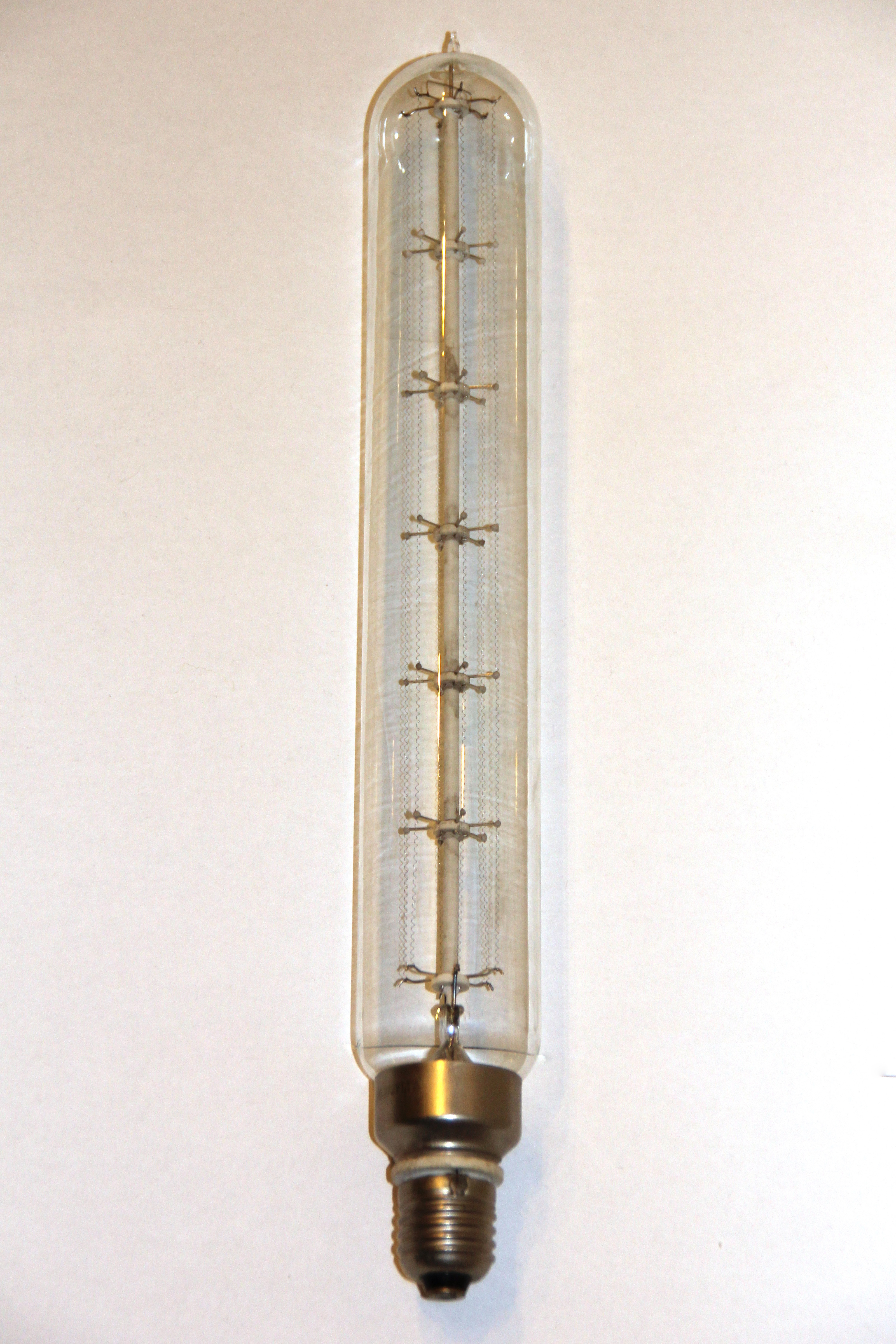 Großer Eisen-Wasserstoff-Widerstand aus DDR-Produktion. Hersteller war Narva, wahrscheinlich der VEB Glühlampenwerk Oberweißbach. 90-270V, 1,1A, E27-Fassung und Gesamtlänge 36 cm.